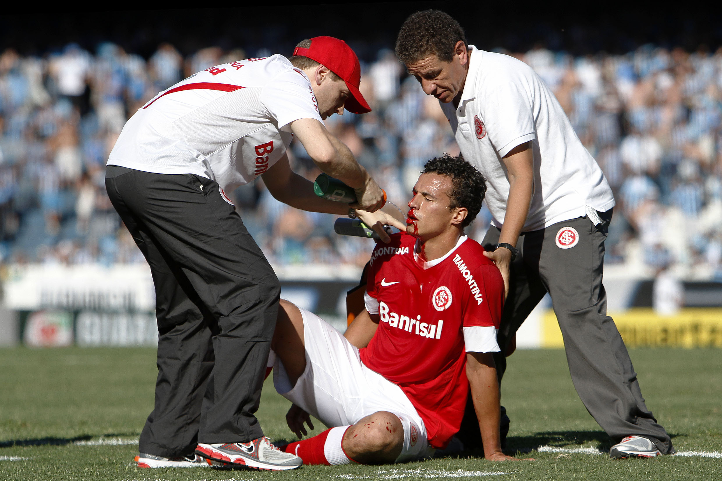 PORTO ALEGRE, RS - FUTEBOL - 02.12.2012 - Damião recebe atendimento médico durante a partida entre Grêmio e Internacional pela última (38ª) rodada do Brasileirão 2012, na tarde desde domingo, no Estádio Olímpico Monumental. Foto: Guilherme Testa